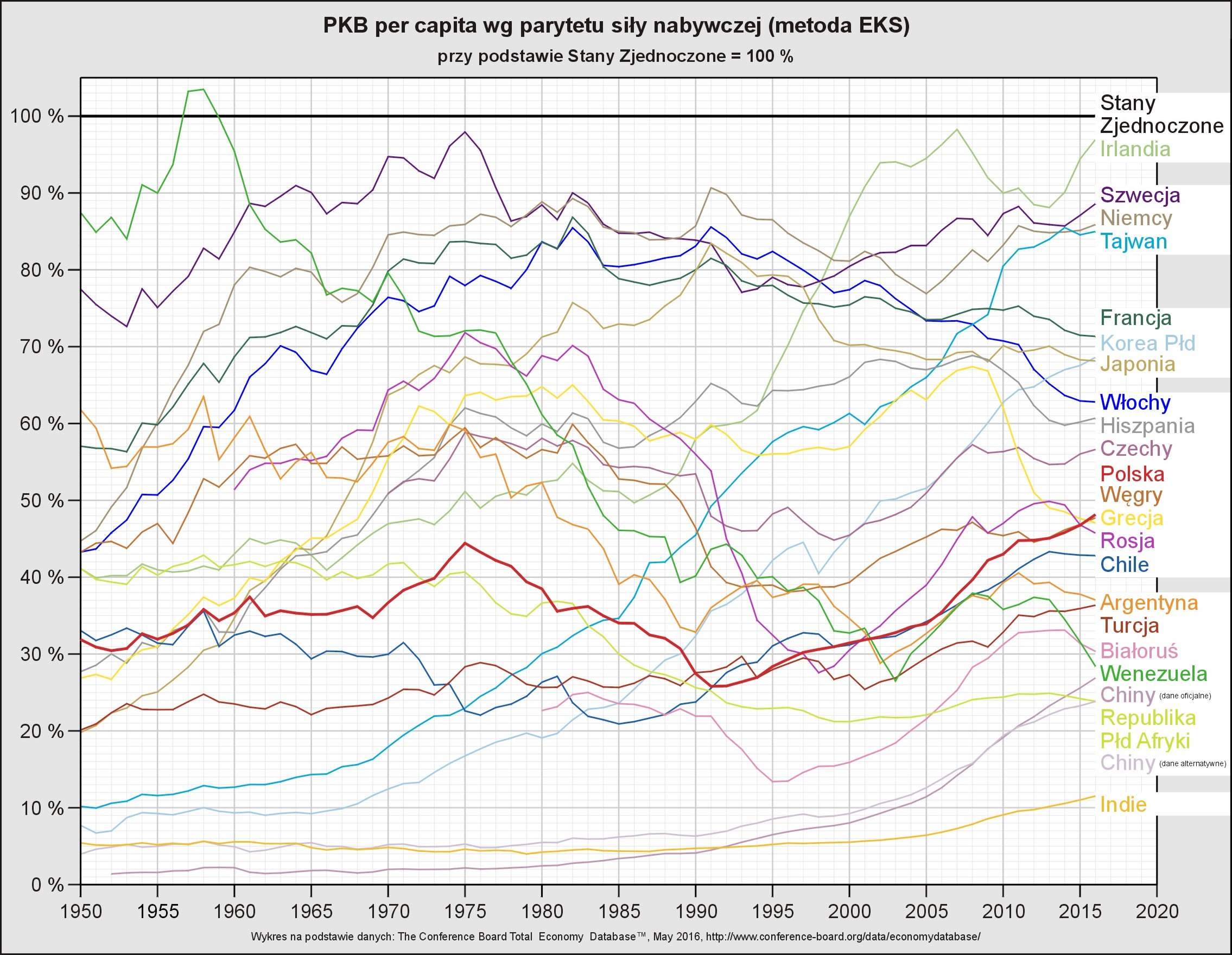 PKB per capita wg parytetu siły nabywczej przy podstawie Stany Zjednoczone = 100 %. Wykres na podstawie danych: The Conference Board Total Economy Database™, May 2015, - "Output, Labor, and Labor Productivity, 1950-2015" (GDP-Capita EKS).